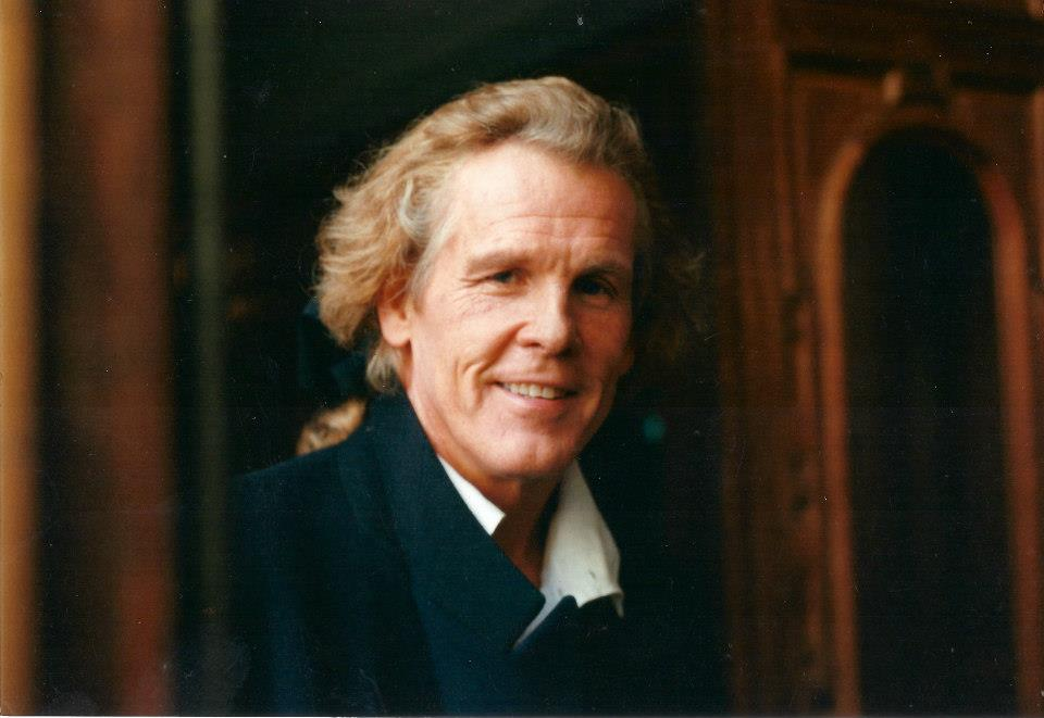 photo prise de Nick Nolte au Chateau de Chantilly en 1992-93 environ